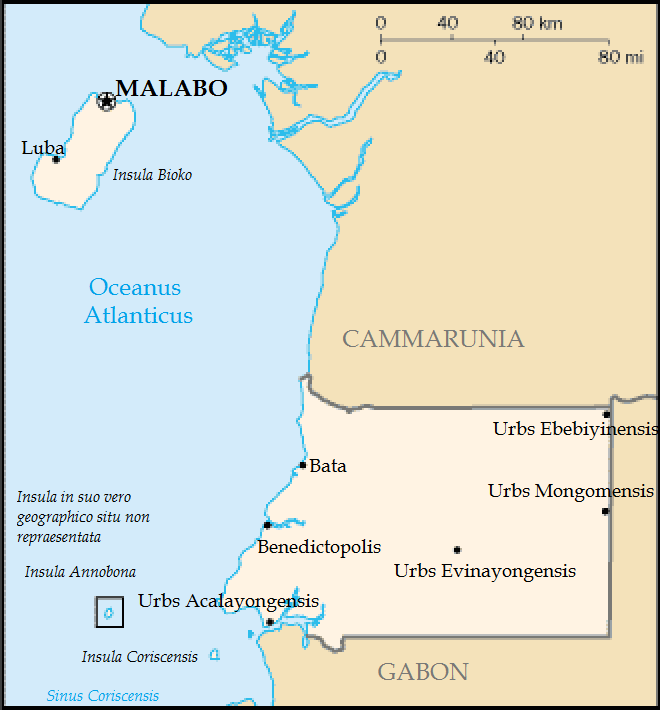 Tabula Guineae Aequinoctialis Latine.